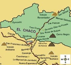 El Chaco